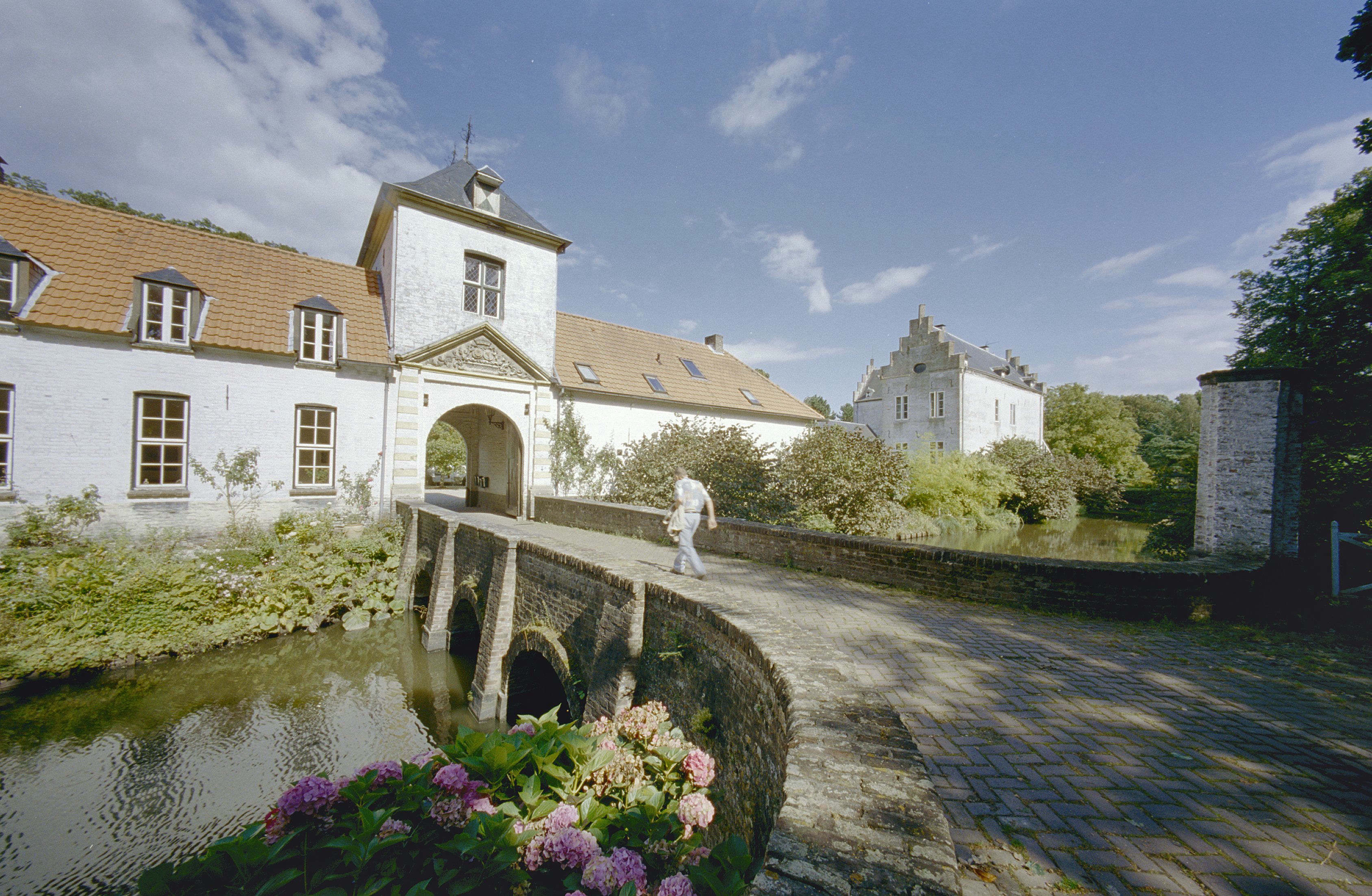 Kasteel Nieuwenbroeck: Overzicht van de vrijstaande poortvleugel met torenvormig poortgebouw met doorrit en fronton met alliantiewapen, toegangsbrug over gracht op de voorgrond (opmerking: Gefotografeerd voor Kastelen in Limburg (1000-1800), Burchten en landhuizen)